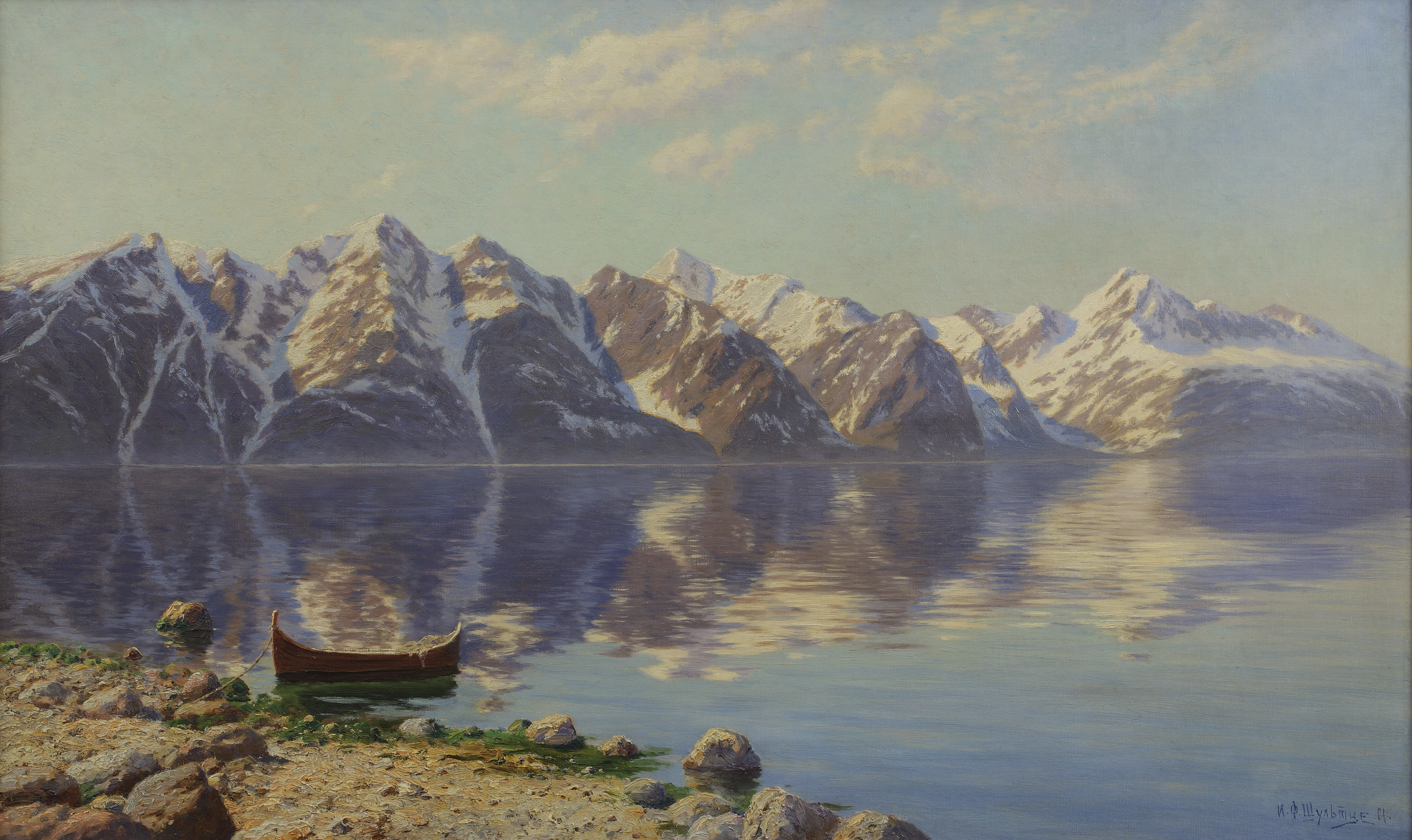 Вместе с Крыжицким Шультце ездил в 1910 году в экспедиции на о.Шпицберген, где написал большое количество арктических пейзажей, датированных этим годом.